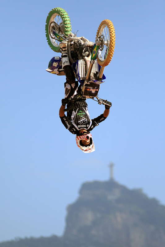 Backflip no sábado e finalmente o céu azul Red Bull X-Fighters etapa Rio de Janeiro